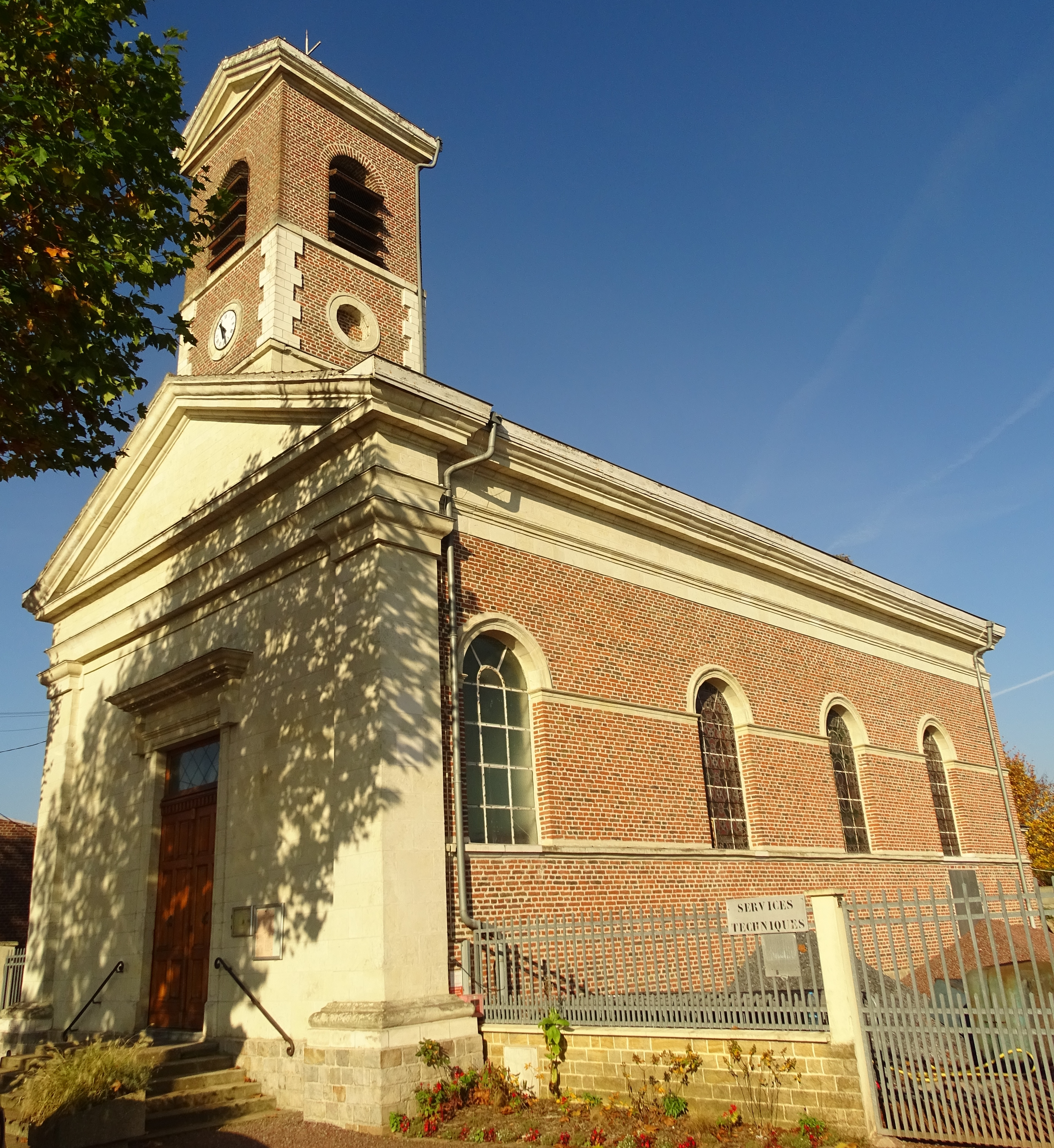 Église Saint-Vincent-de-Paul de Wandignies-Hamage.